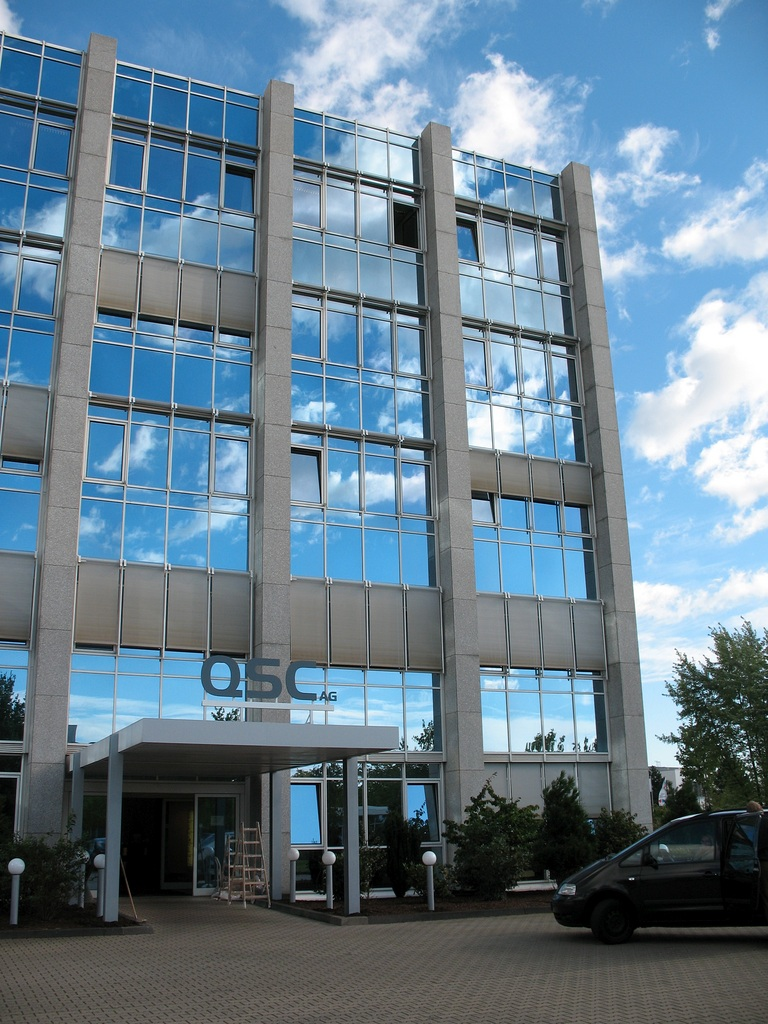 Eingang des QSC-Gebäudes in Köln-Ossendorf